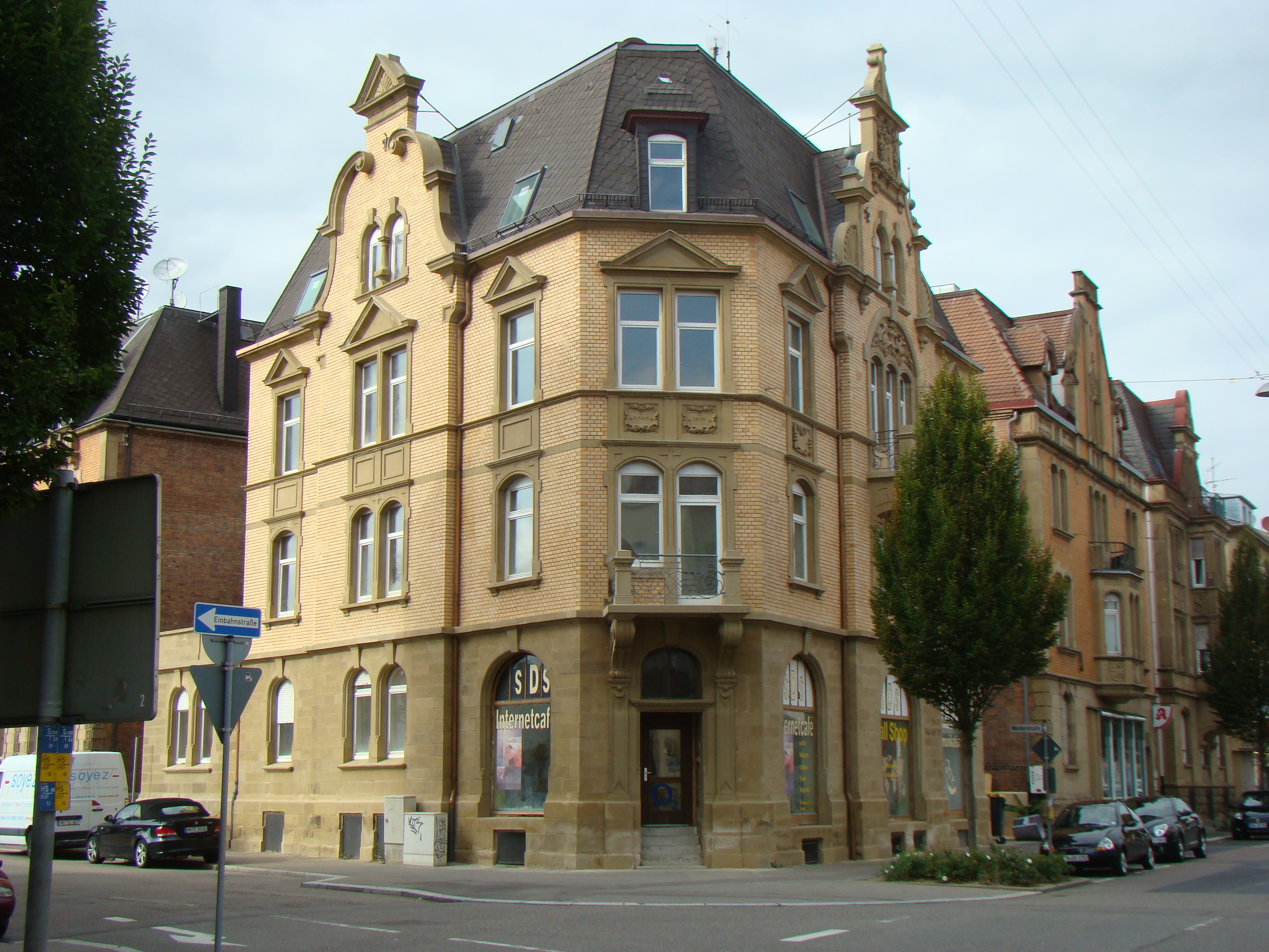 Wilhelmstraße 56 in Heilbronn, vgl. Denkmaltopographie Ba-Wü I.5 Heilbronn (2007), S. 139